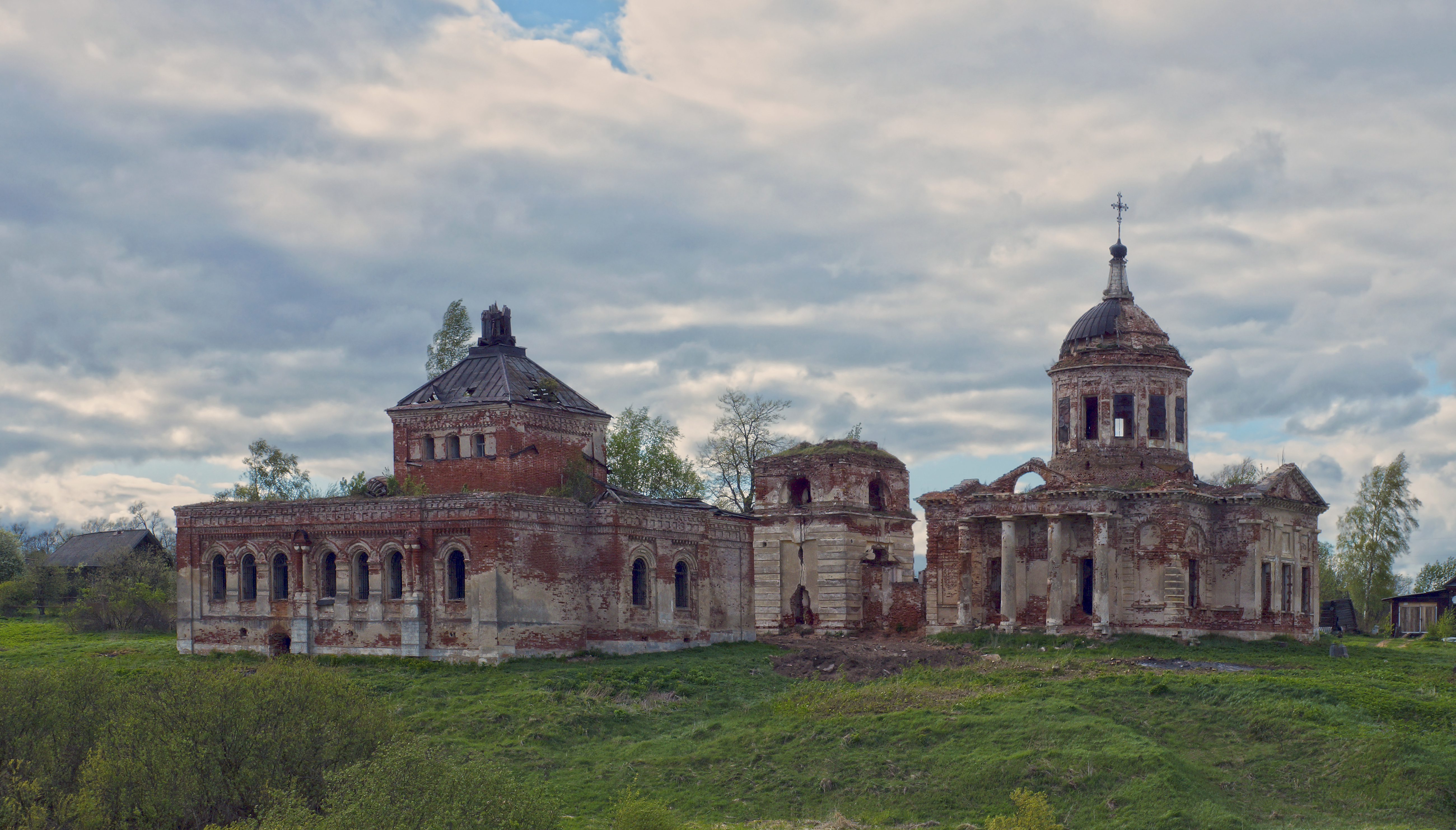 Храмовый комплекс: Кунгалово, Торжокский район, Тверская область